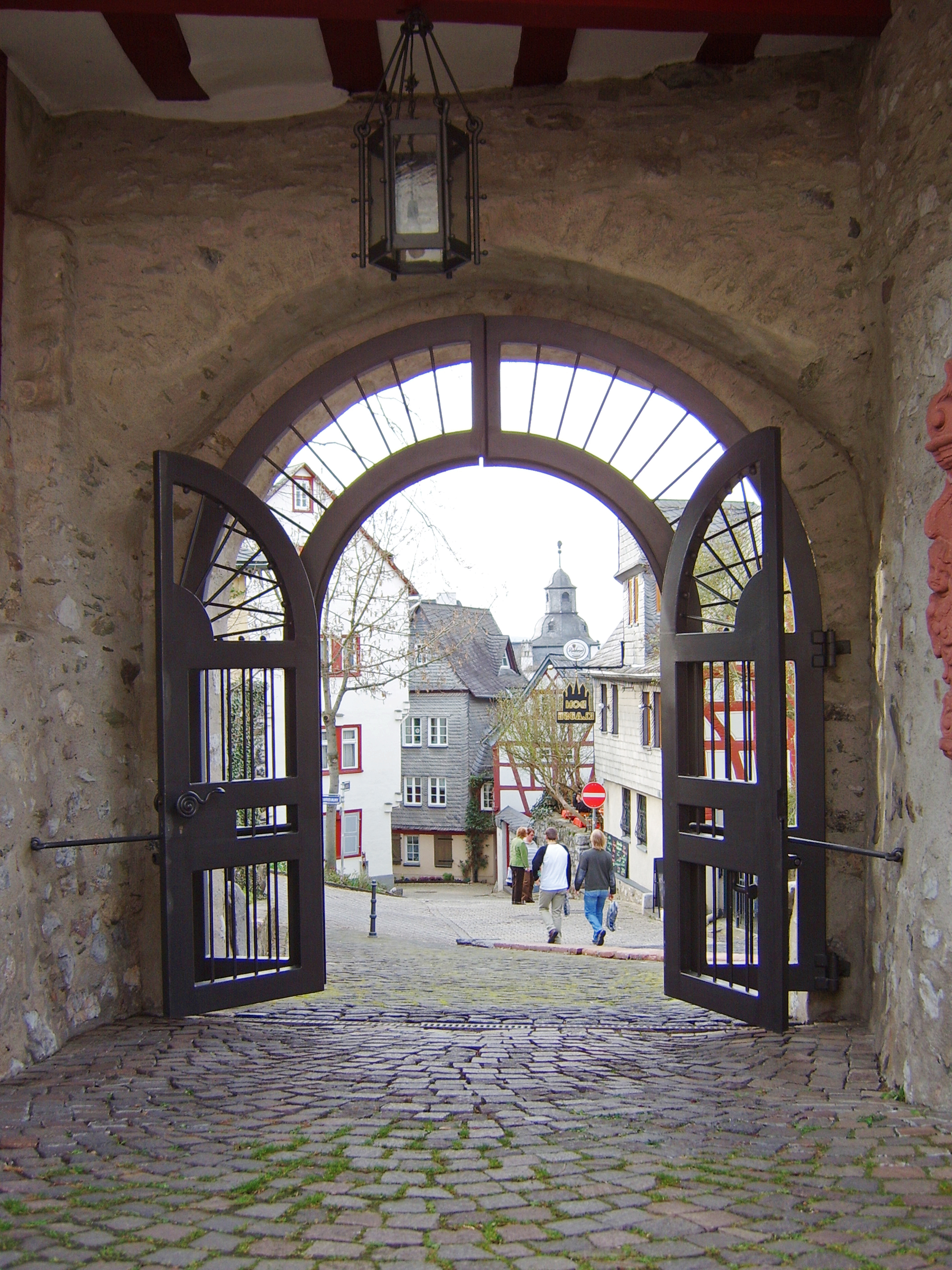 Blick durch ein Tor, nahe dem Limburger Domschatz